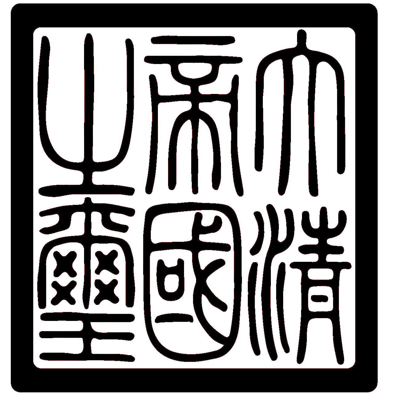 חותם קיסרי